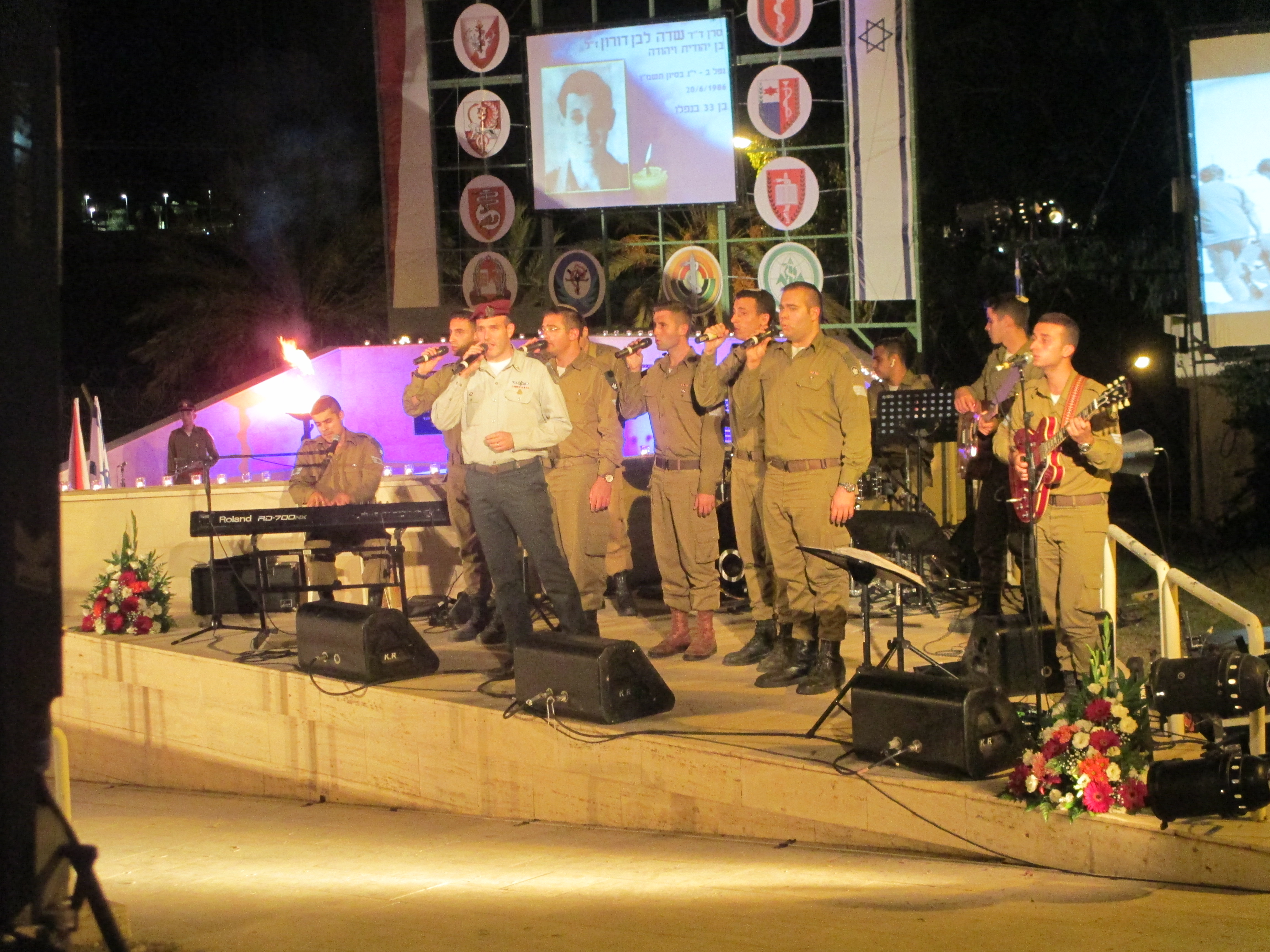 מקהלת הרבנות הצבאית והחזן הצבאי הראשי שי אברמסון בטקס זיכרון לחללי חיל הרפואה, חיפה, 2016.